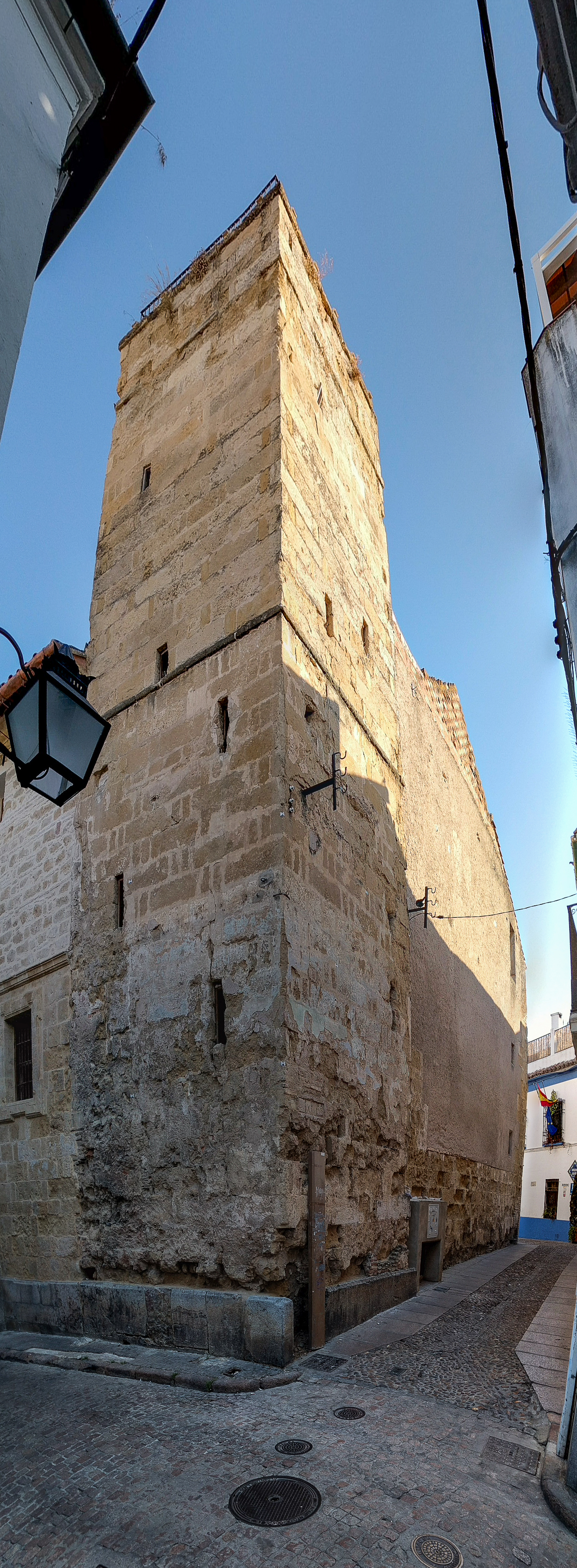 Torre-alminar de Santa Clara